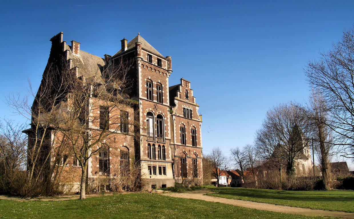 Kasteel d'Exaerde, Humelgem, Steenokkerzeel